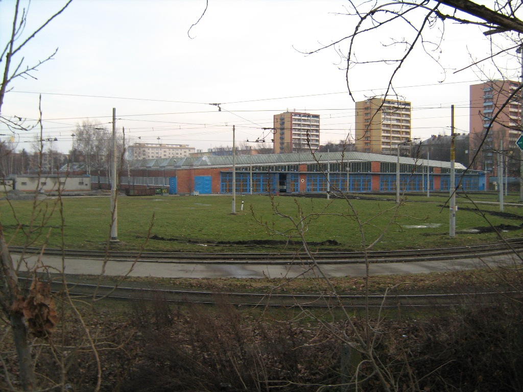 Vozovna Poruba, Ostrava, Cz/ Public transport facilities, Ostrava-Poruba, CZ